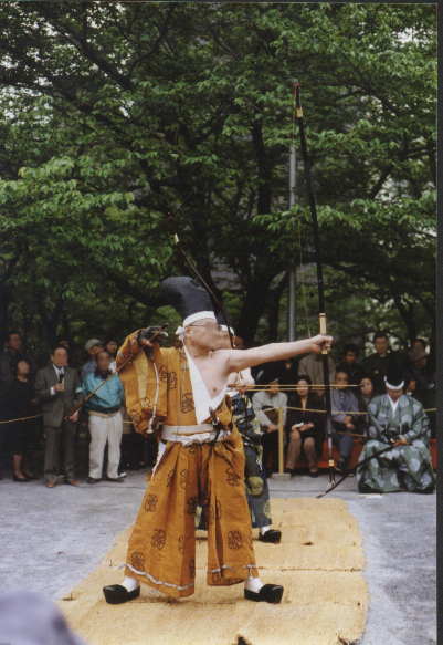 弓道, 弓術, 小笠原流, 草鹿式, Kyudo, Kyujutsu, Ogasawara-ryu, Kusajishi seremony.